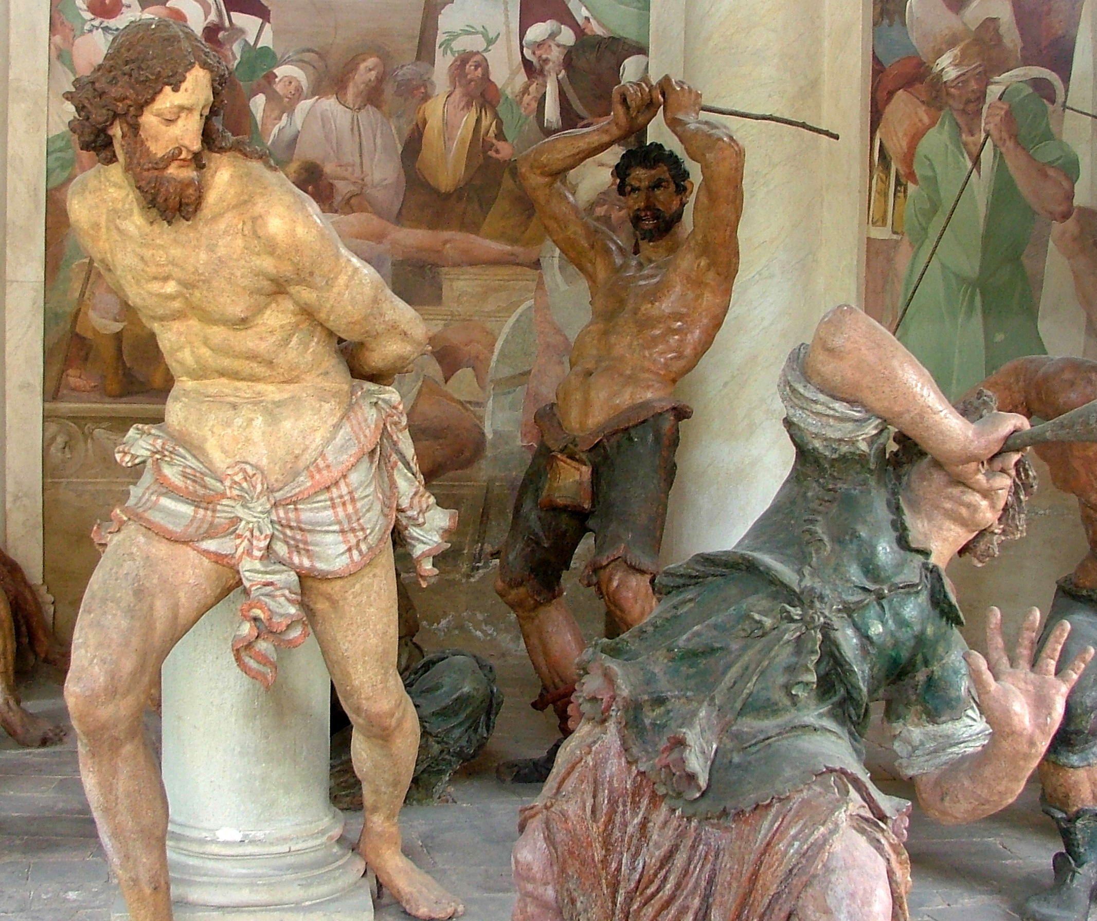 Sacro Monte di Varese, Cappella VII. Szene im Barock Stil (la Flagellazione).